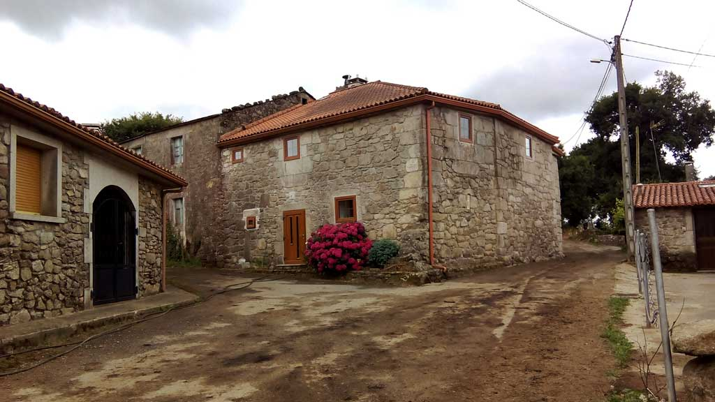 Vista de Carroipaz,Curtis.